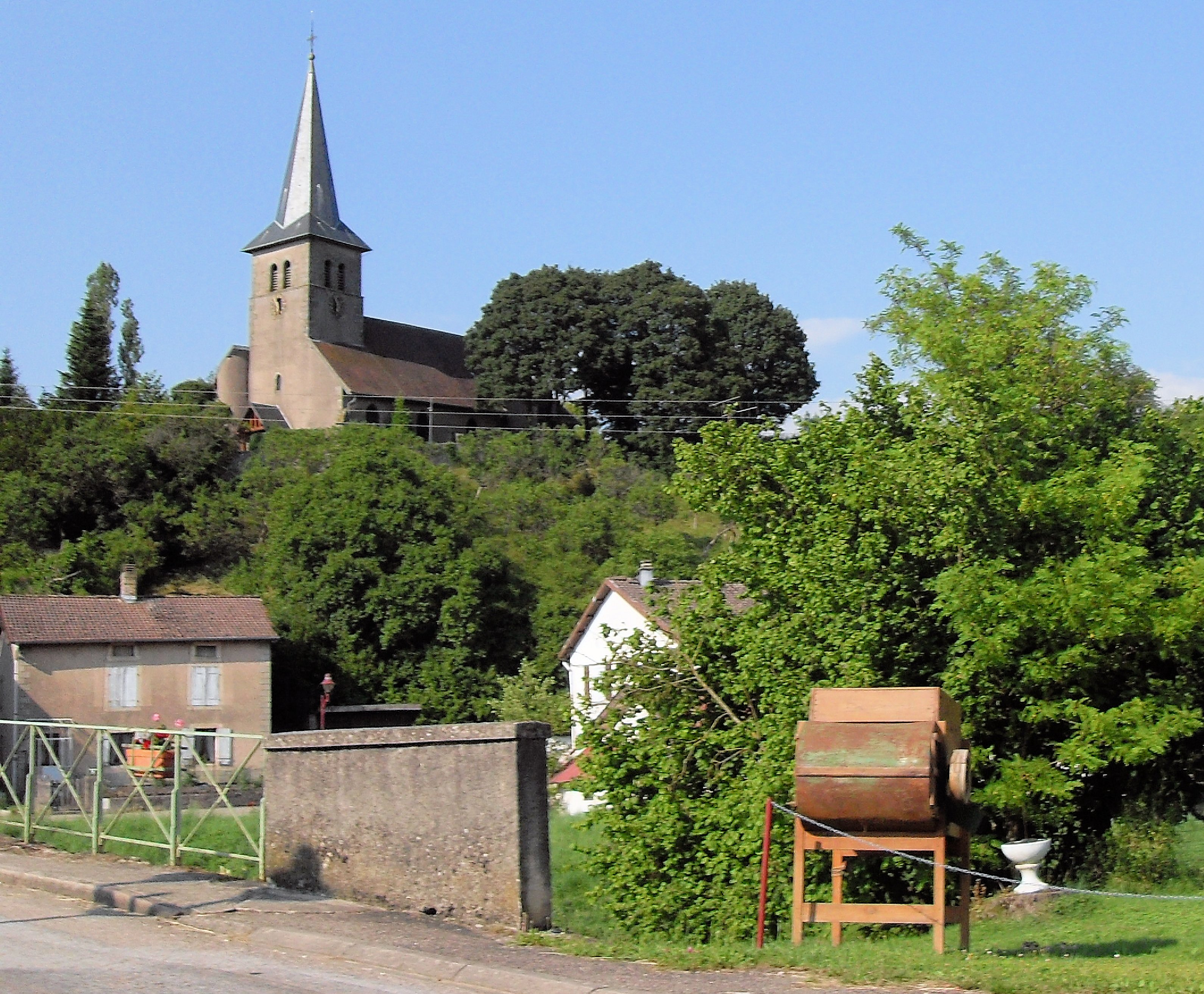 Surplombant le village de Domèvre-sur-Durbion avec l'église de Saint-Maurice